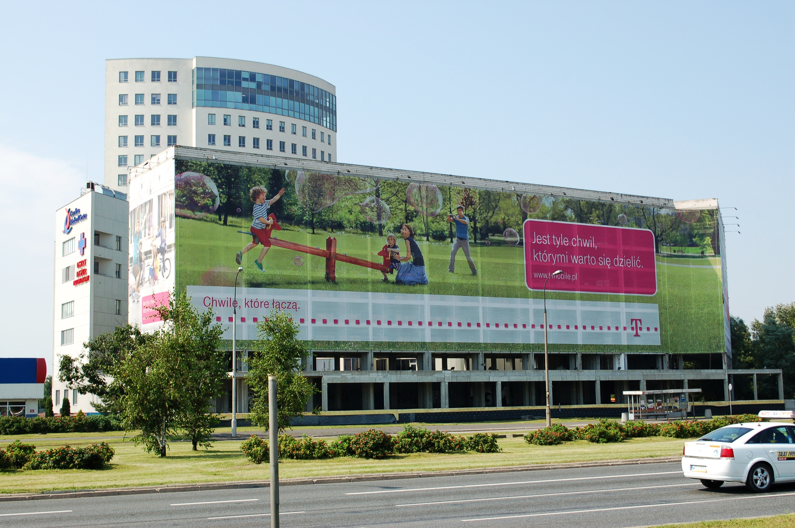 Sobieskiegio-Str Ecke Dolina Służewiecka, kurz vor Uebergang in die Sikorskiego, Warschau